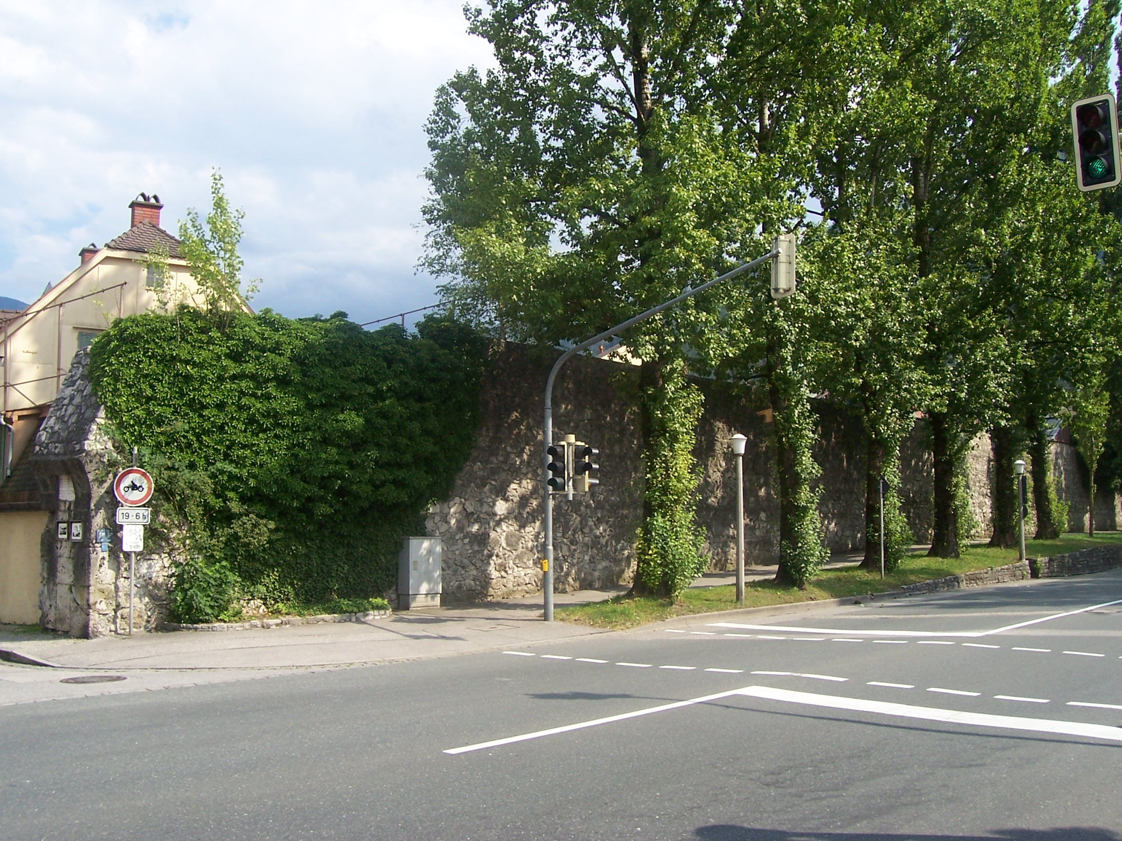 Stadtmauer von Bad Reichenhall entlang der Innsbruckerstraße, Abzweigung Angerl Bei Verwendung bitte ich hier um einen Hinweis, wo das Foto genutzt wird.